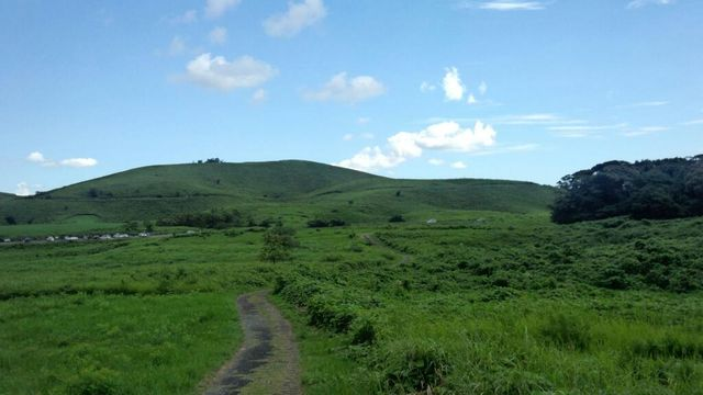 山口県美祢市秋吉台 Akiyosidai in Mine Акыйошидаи в Mинe